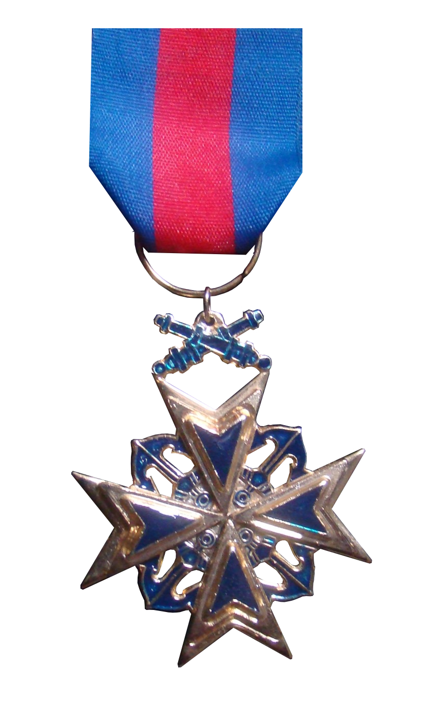 Orden al merito naval 3ra clase